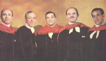 Hermanos Ábalos, conjunto folclórico argentino